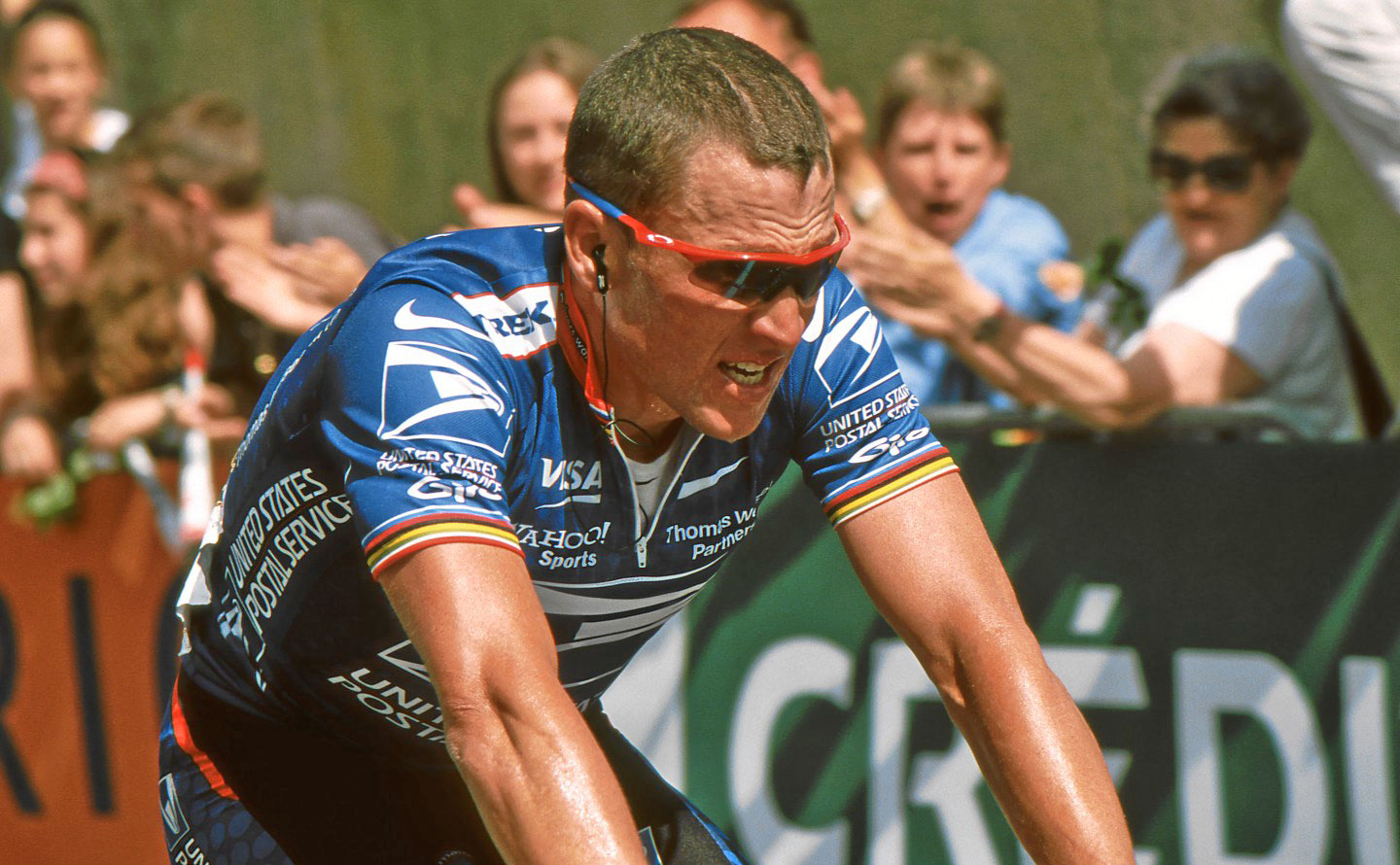 Sujet:De Lance Armstrong 2002 am "Midi Libre" Source:Eege Foto vum Benutzer:Hase